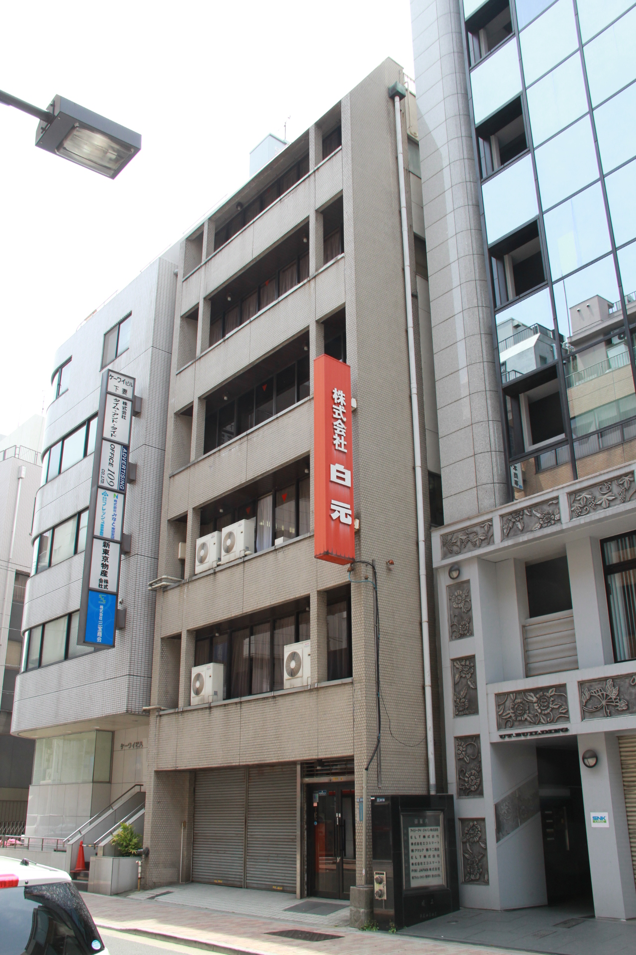 白元本社（東京都台東区）